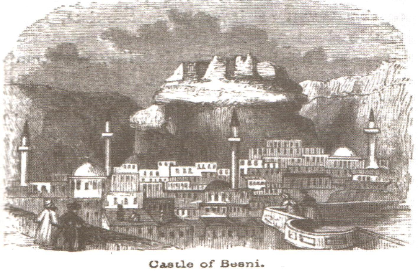 William Francis Ainsworth'un çizdiği Besni gravürü